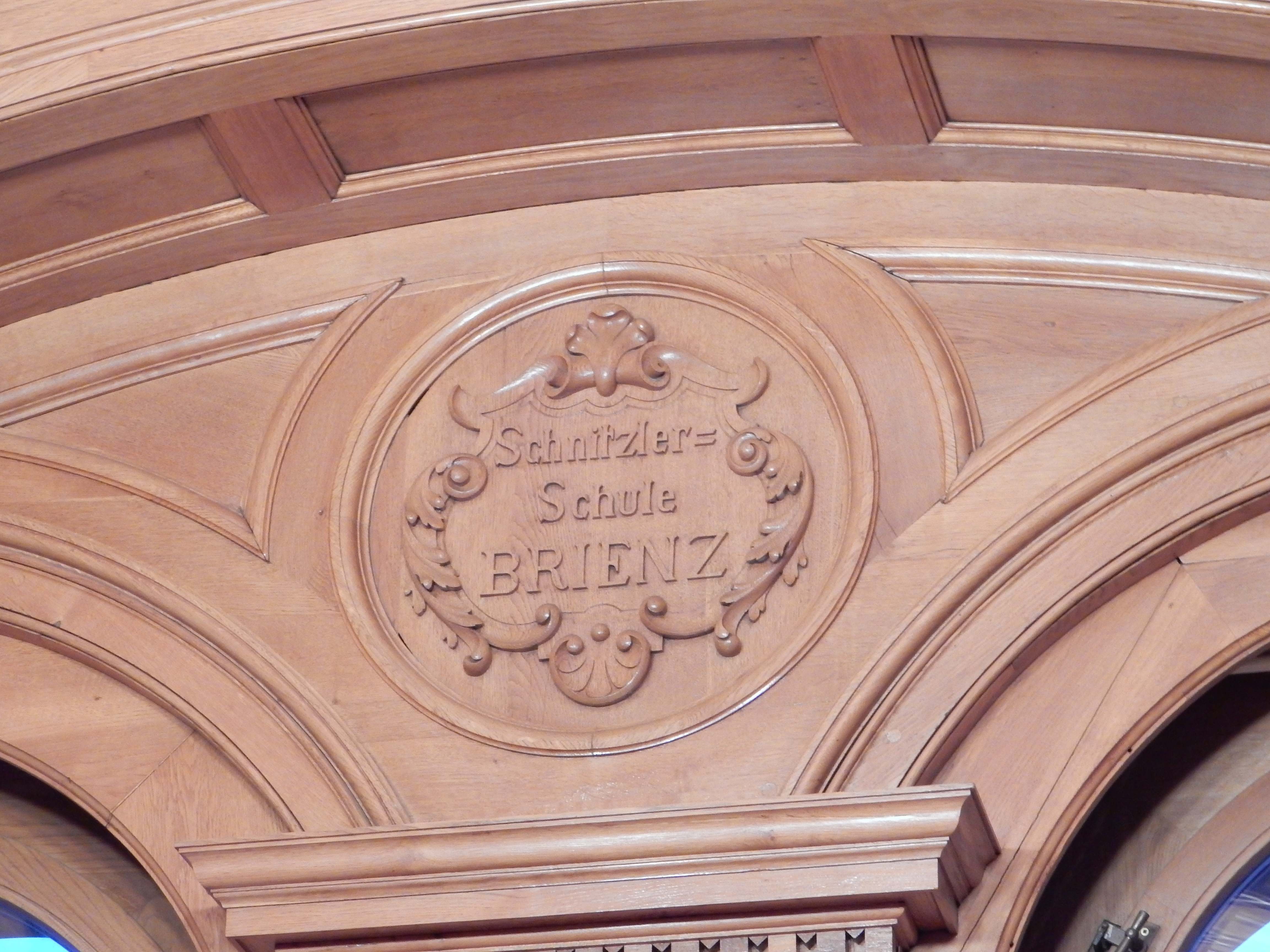 Brienzer Zimmer im Bundeshaus (Bern/Schweiz): Inschrift "Schnitzler=Schule BRIENZ"